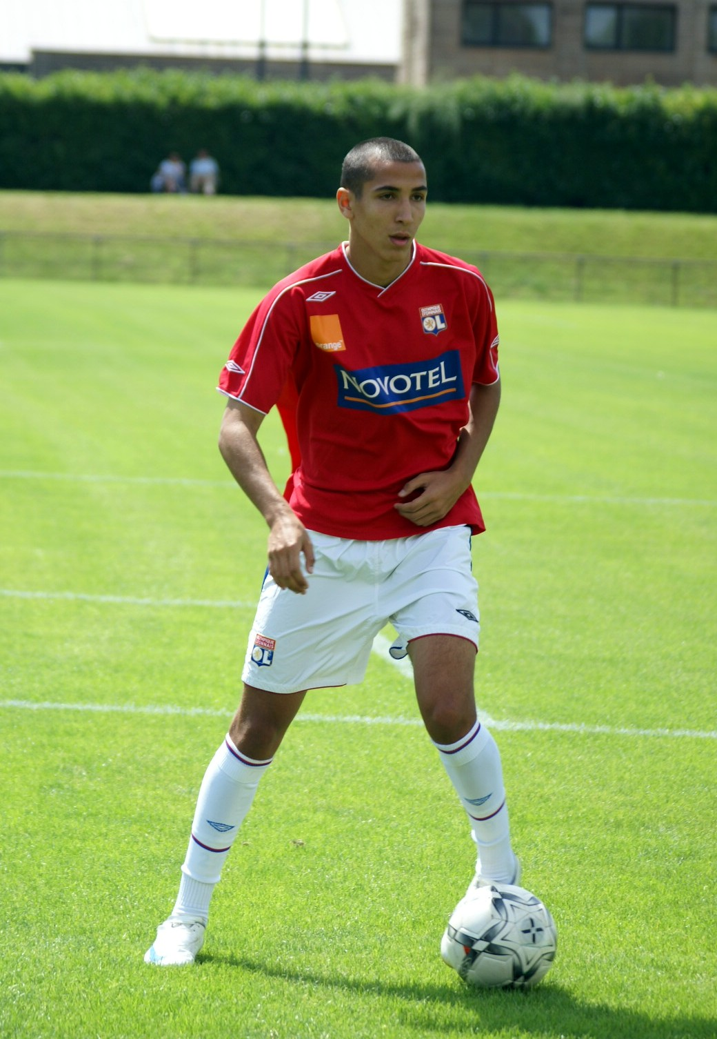 Yannis TAFER